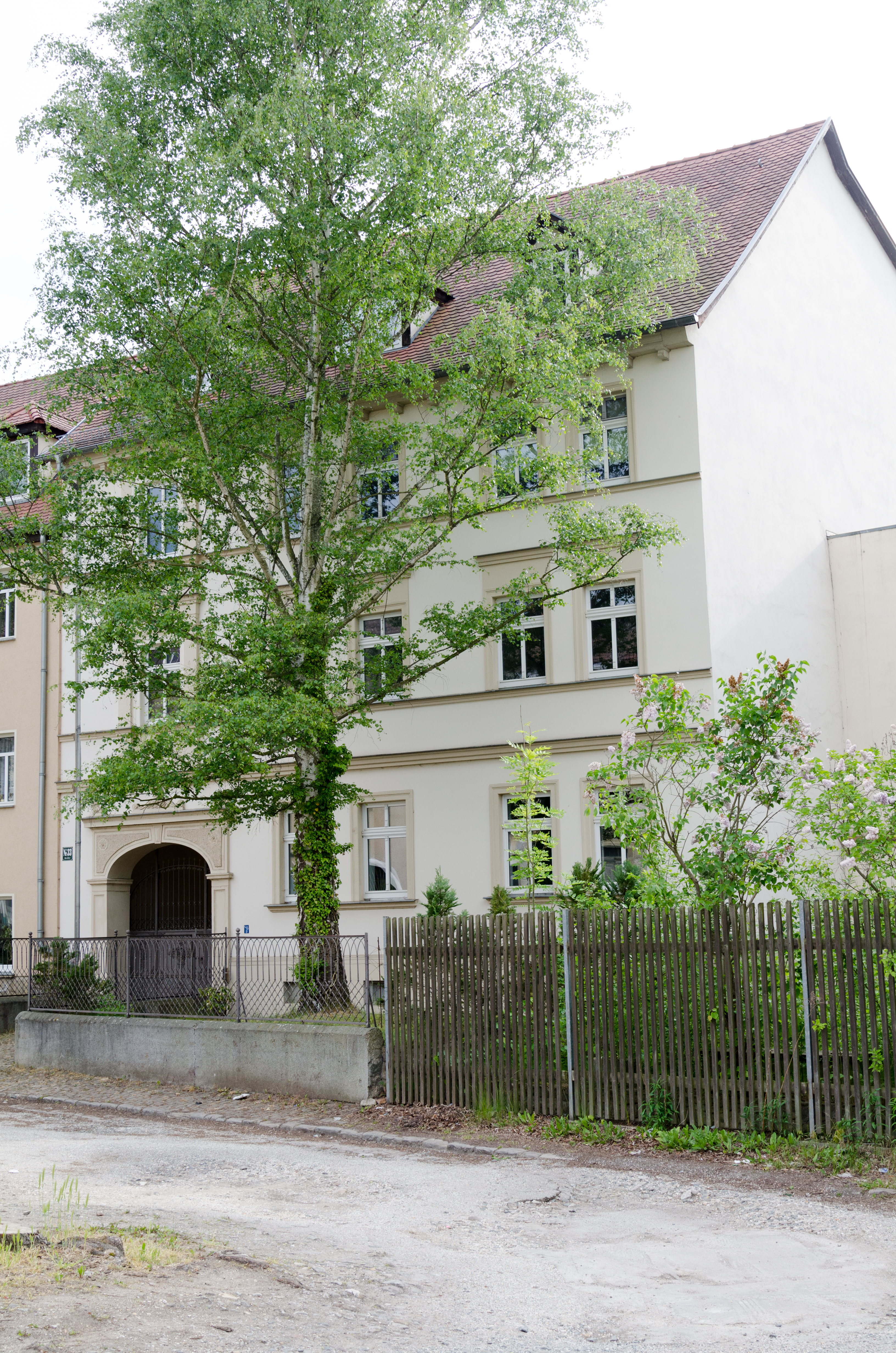 Zeitz, Brühl 33